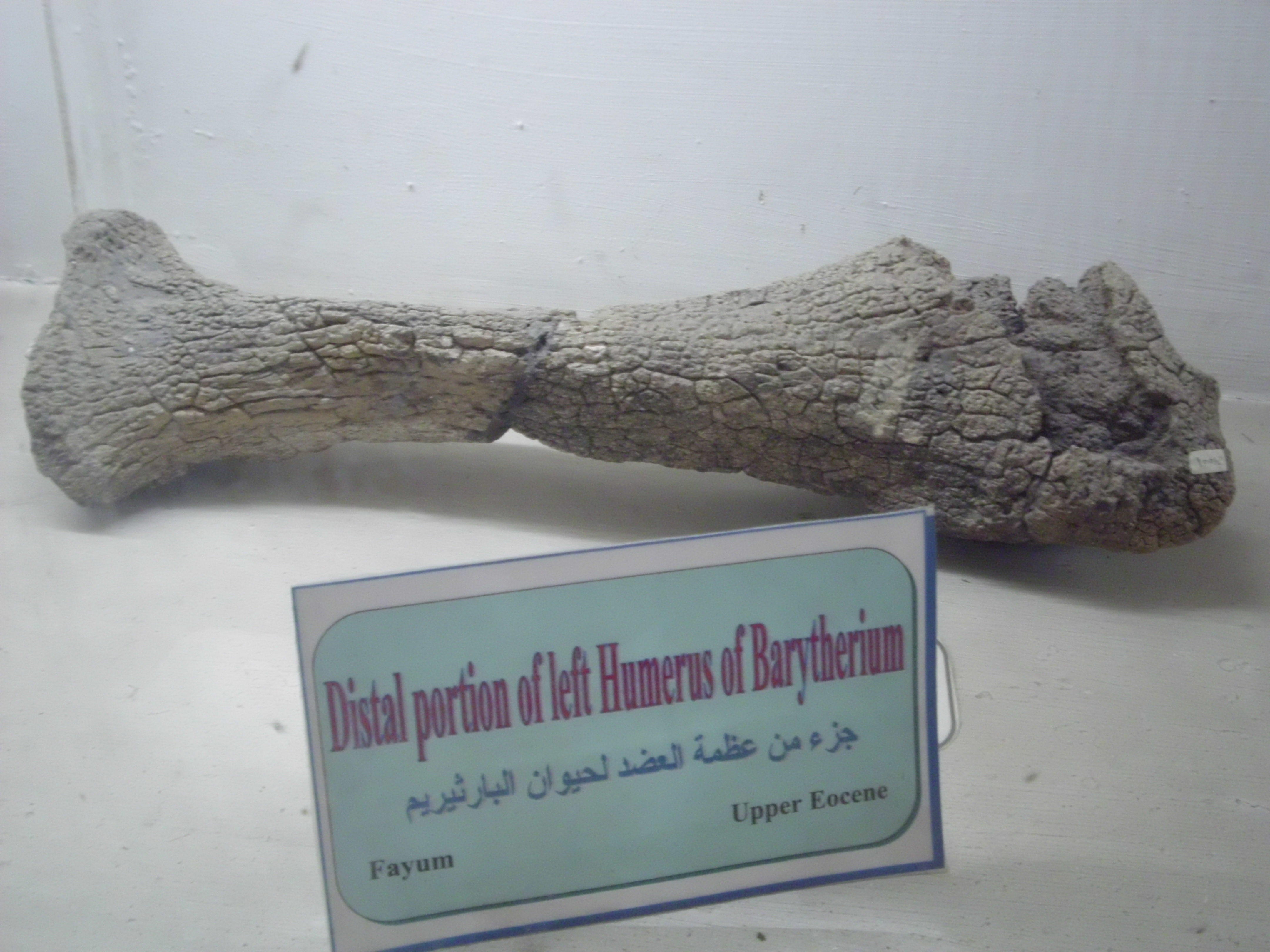 جزء من عظمة العضد لحيوان بارثيريم